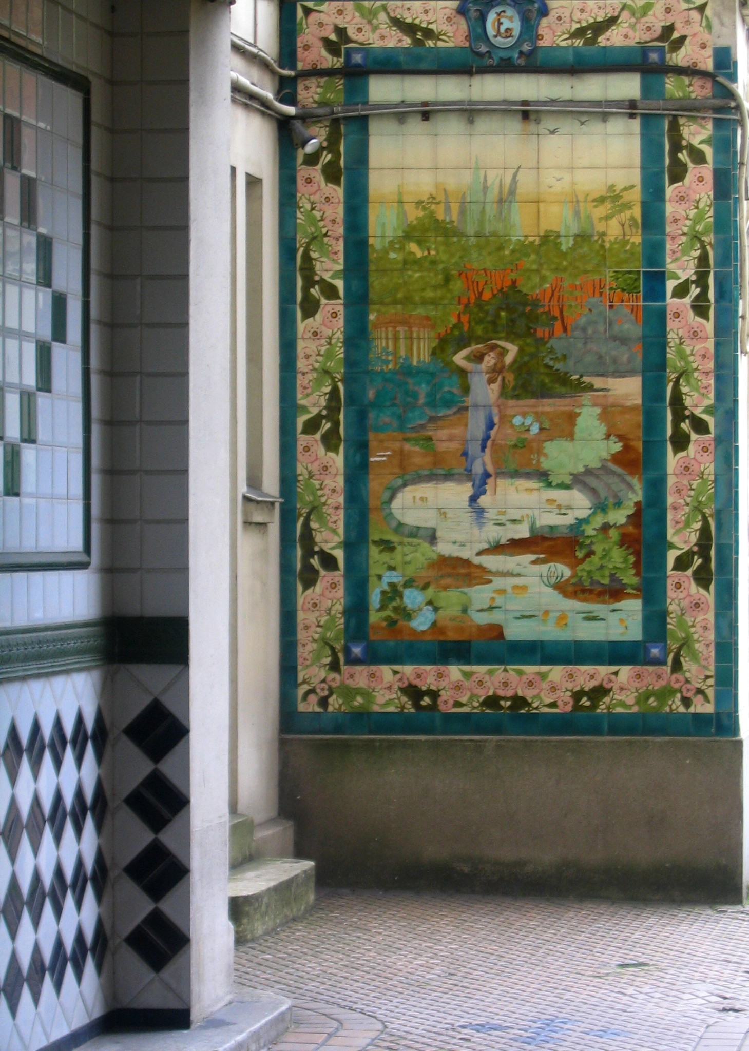 Bains publics Montansier, Vincennes, France (XIXe s) détail